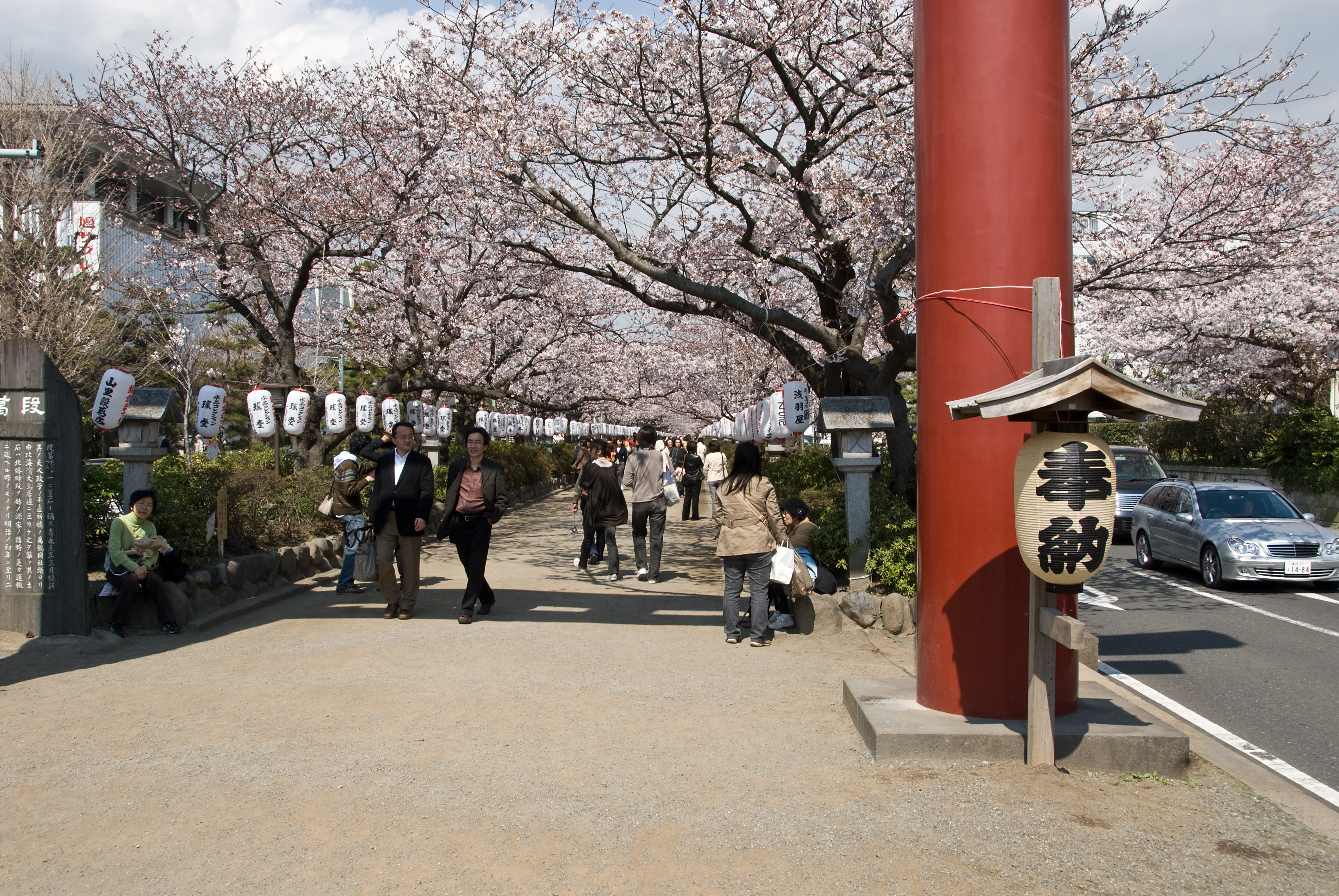 Cherry Blossoms in Kamakura's Dankazura, Tsurugaoka Hachiman-gū.